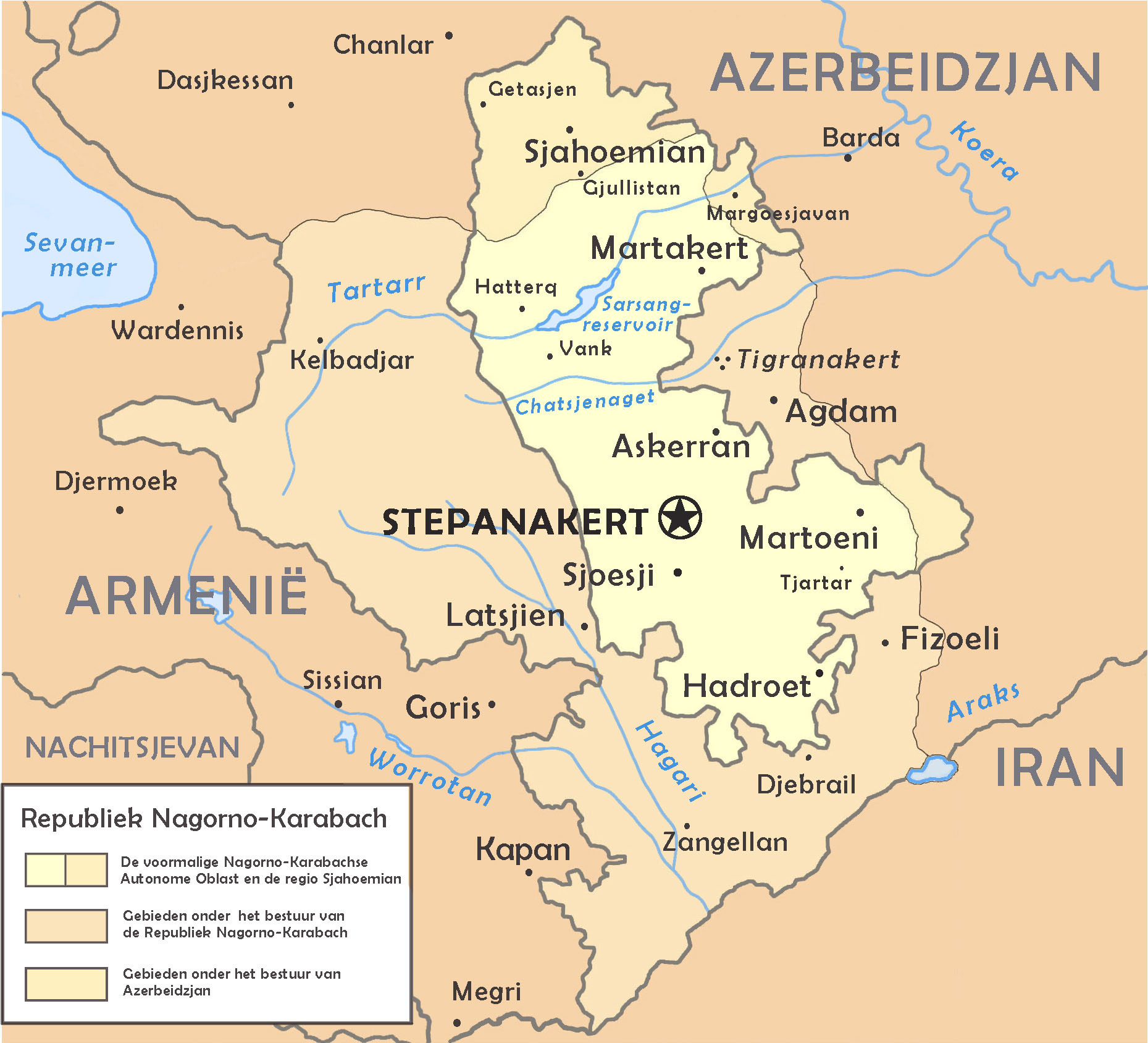 kaart van de republiek Nagorno-Karabach